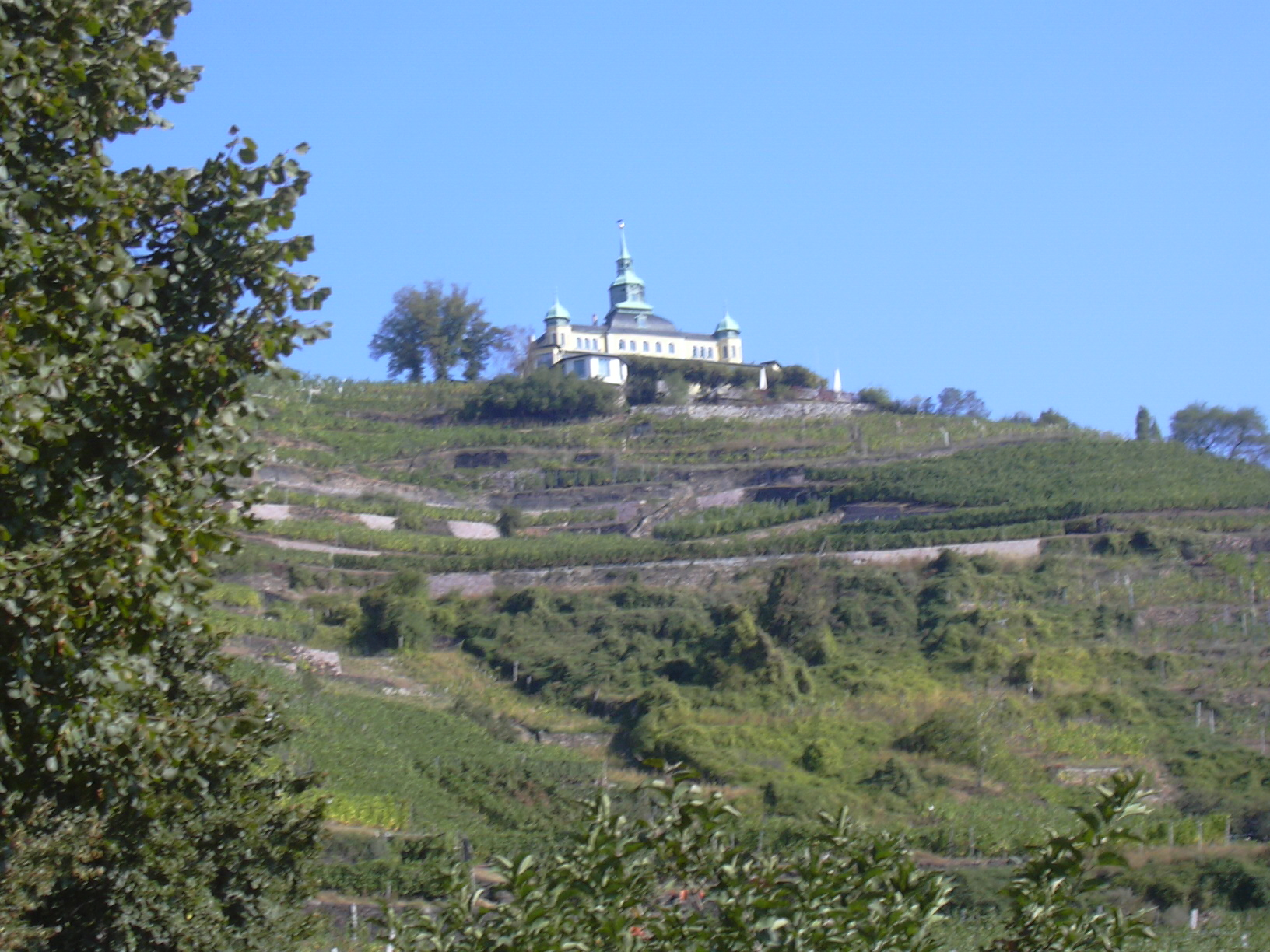 Spitzhaus (Pöppelmann), Saxon Wine Route, Saxony/Germany